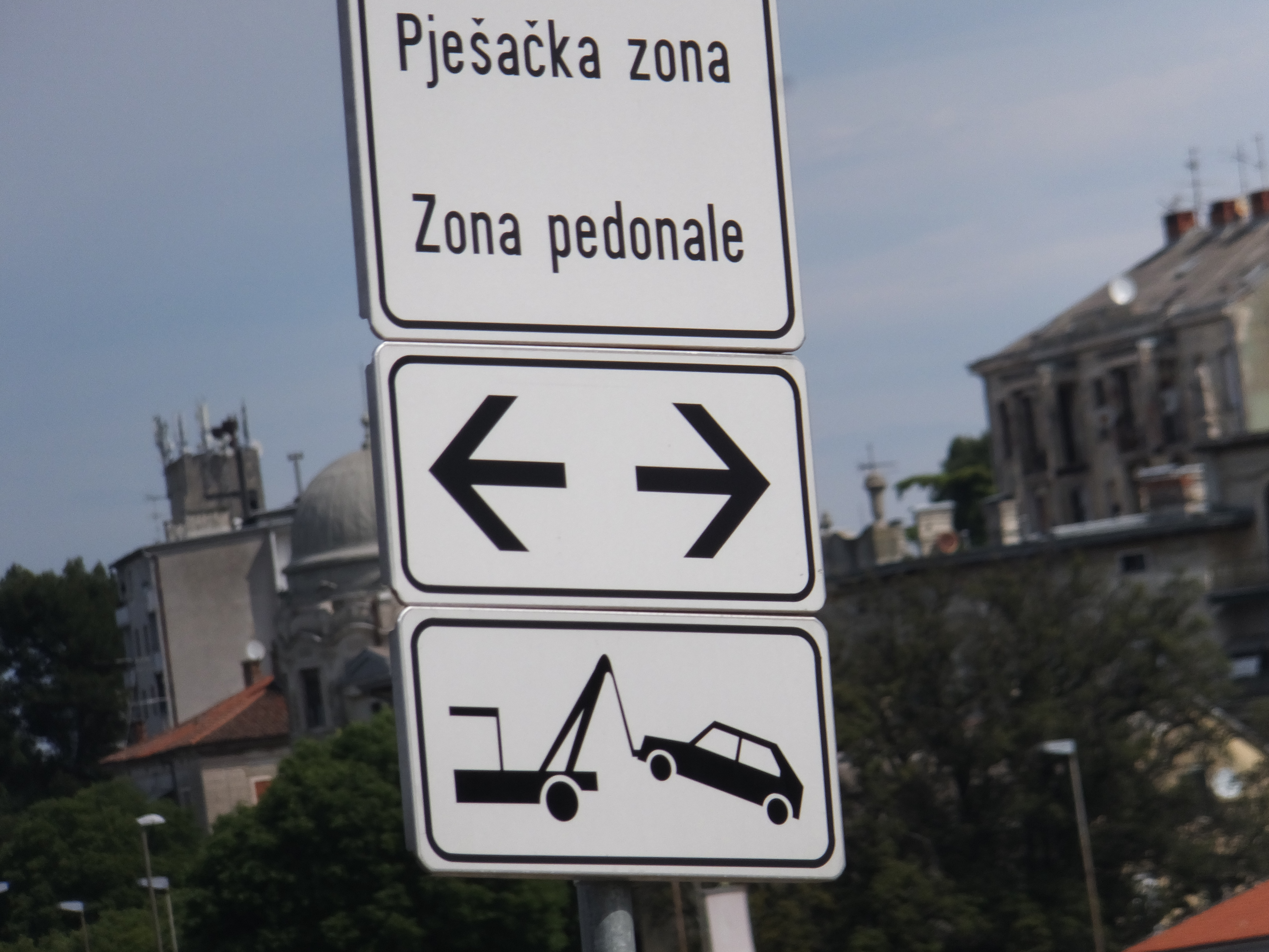 Pula